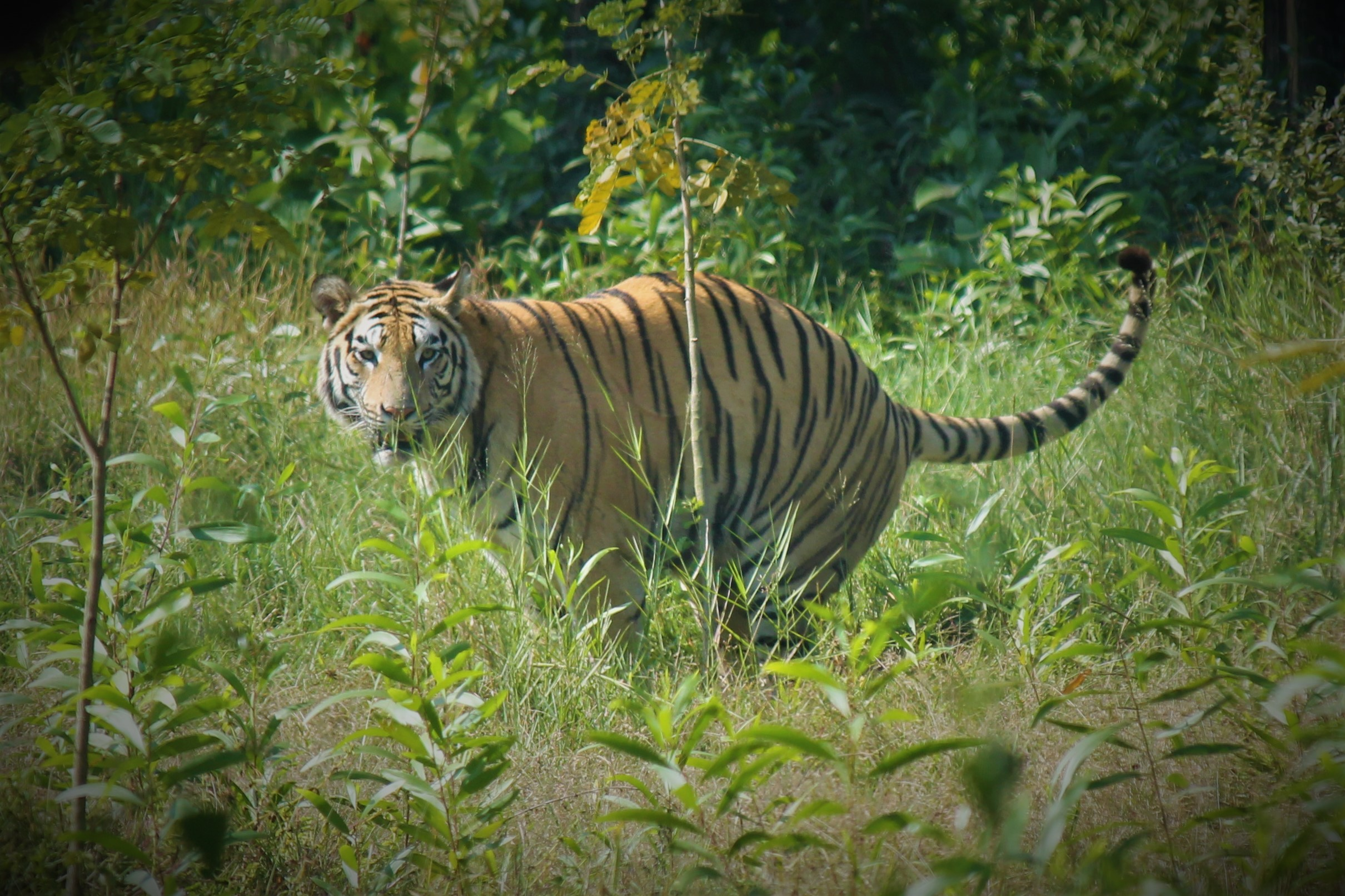 বঙ্গবন্ধু শেখ মুজিব সাফারি পার্ক